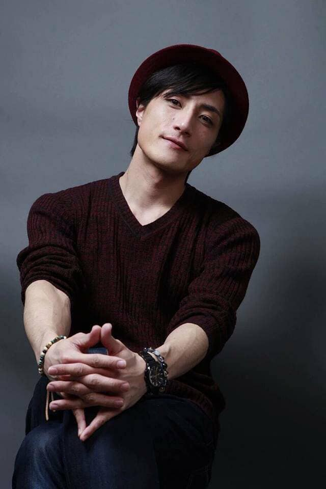 福地教光（俳優）